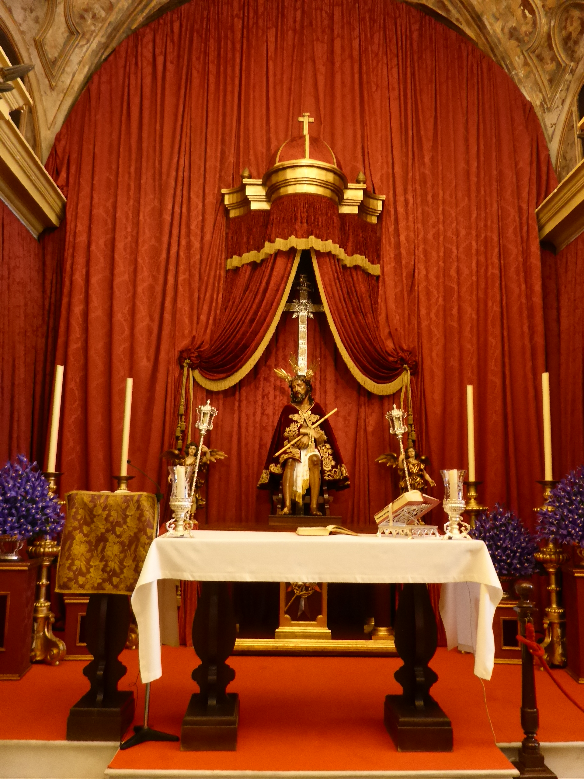 Interior de la Capilla del Refugio de Nuestra Señora de los Desamparados de Jerez de la Frontera (Andalucía, España)